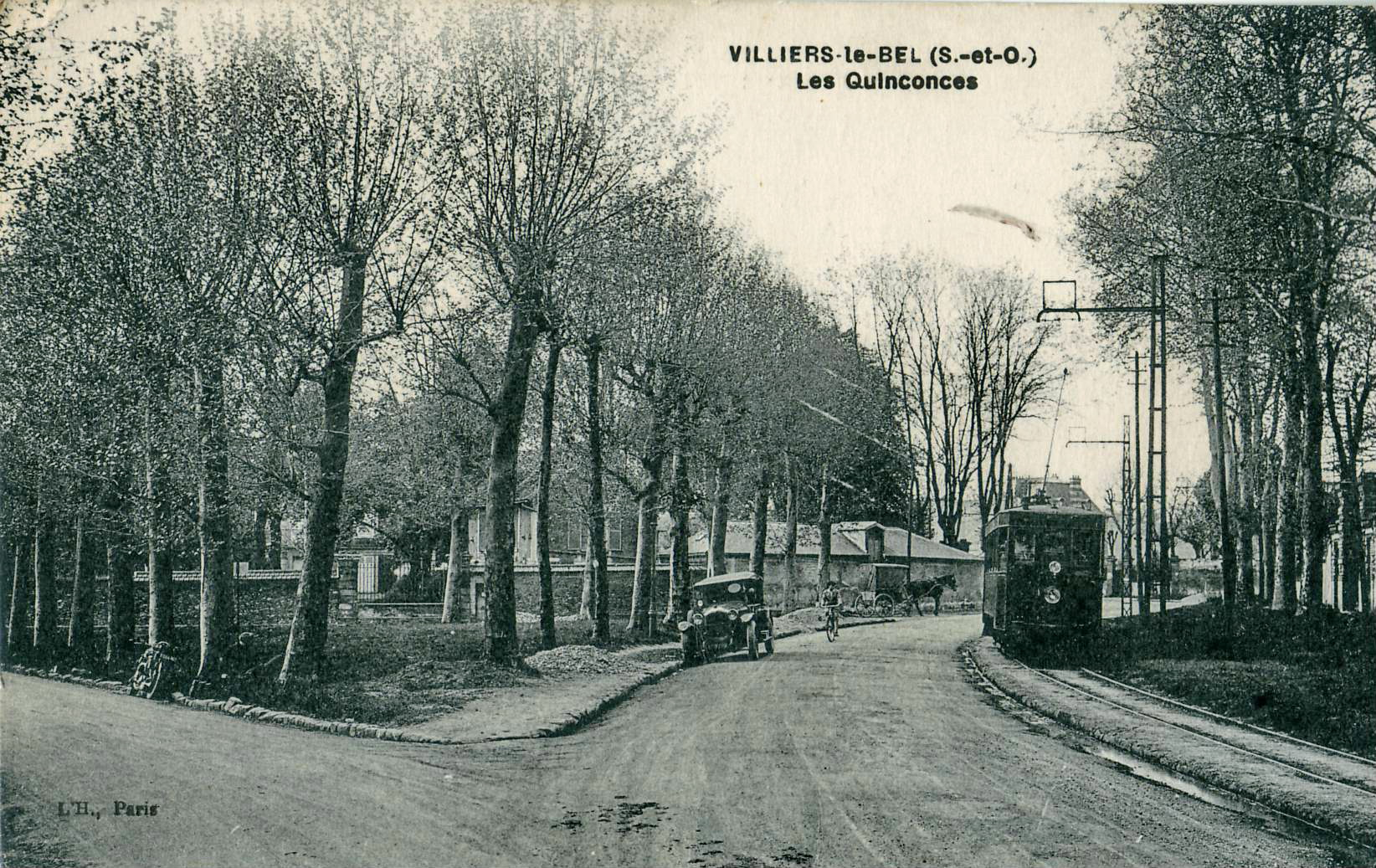 Carte postale ancienne éditée par l'H VILLIERS-LE-BEL : Les Quinconces